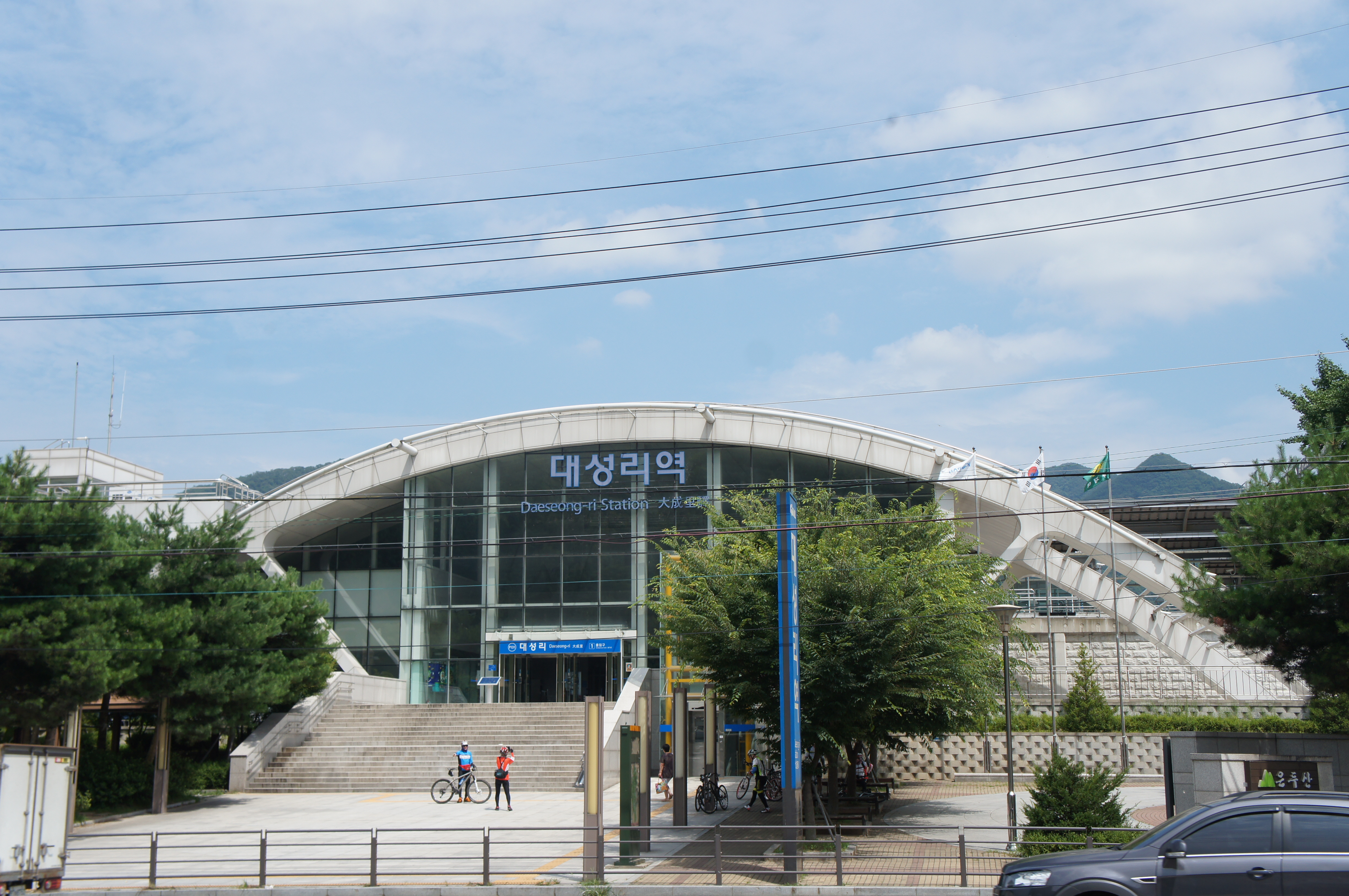 대성리역 역사